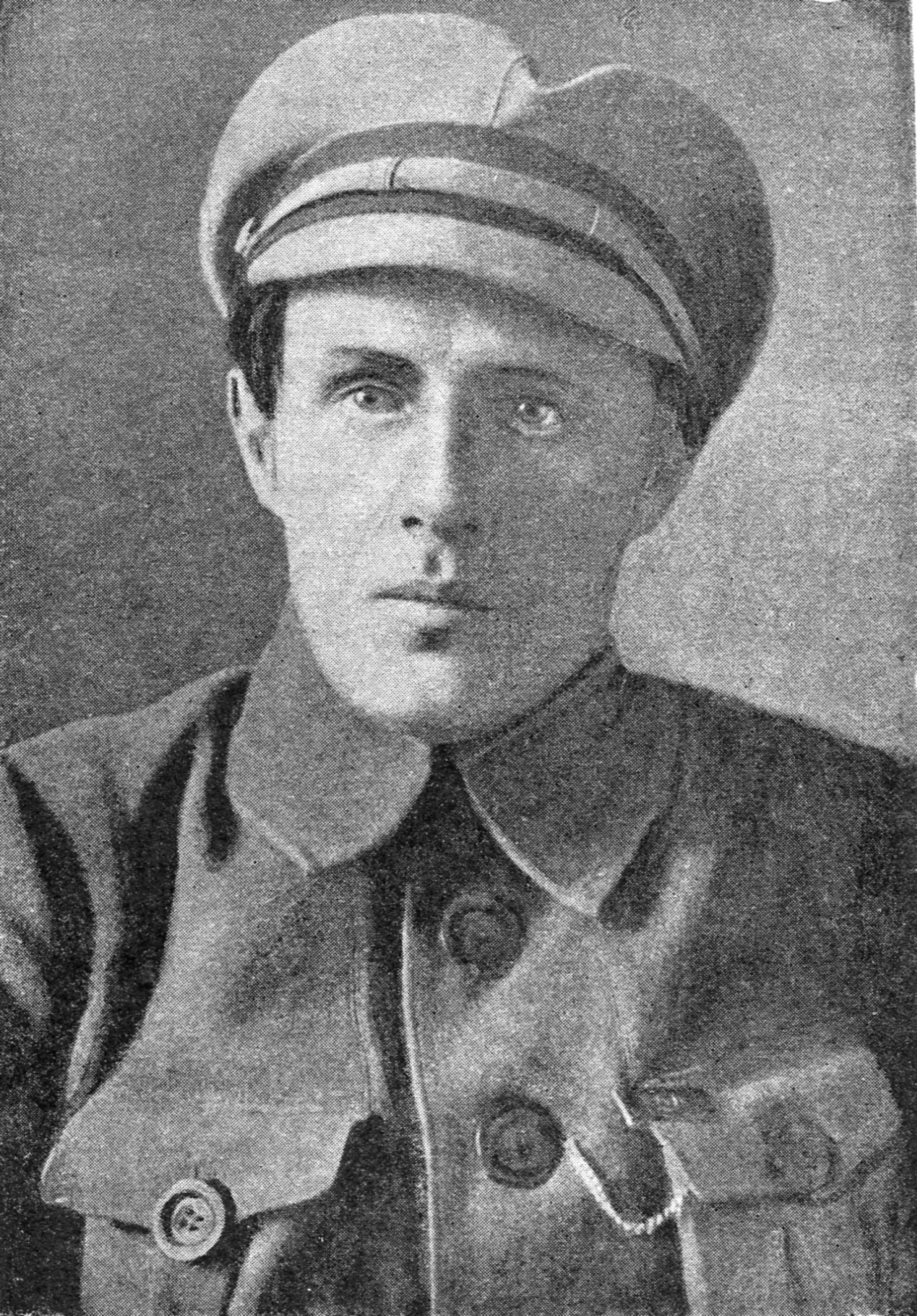 А. В. Іванов, Київ, 1920-ті роки